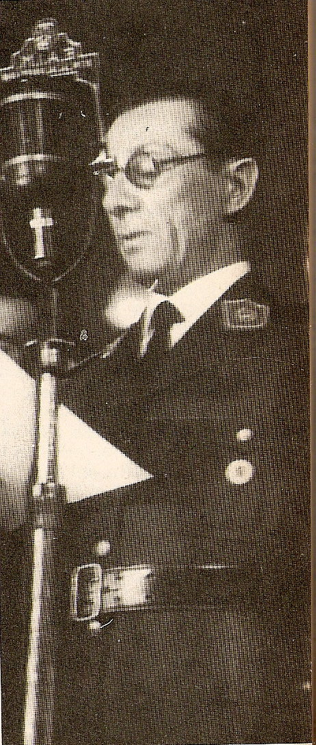 Pedro Pablo Ramírez toma juramento a su primer gabinete, 7 de junio de 1943.